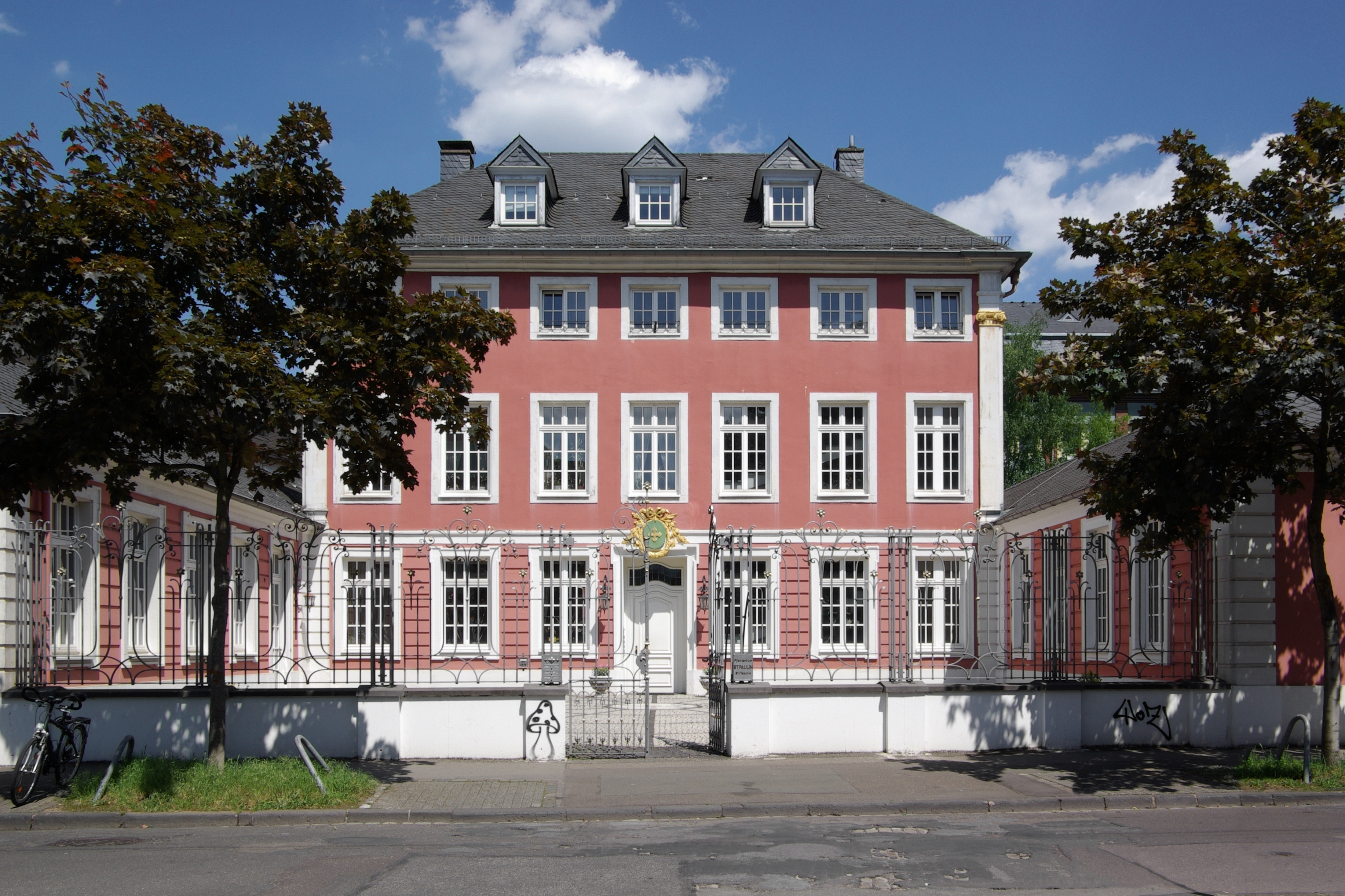 Trier, Balthasar-Neumann-Straße 4: ehemalige Kurie des Stifts St. Paulin; stattlicher zweieinhalbgeschossiger barocker Walmdachbau, 1779–82